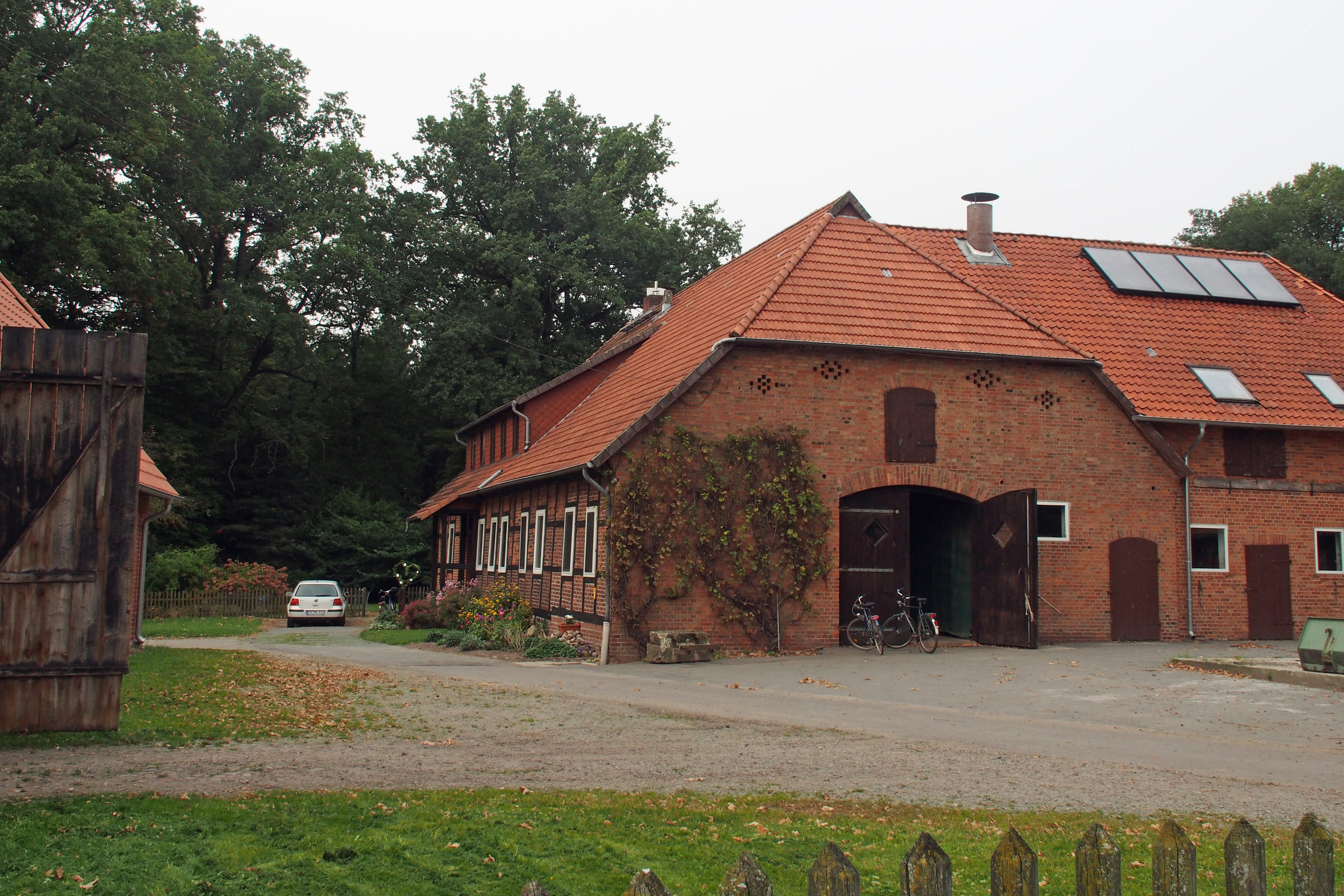 Bauernhof in Eldingen Ortsteil Heese Nr. 1, Niedersachsen (Germany)